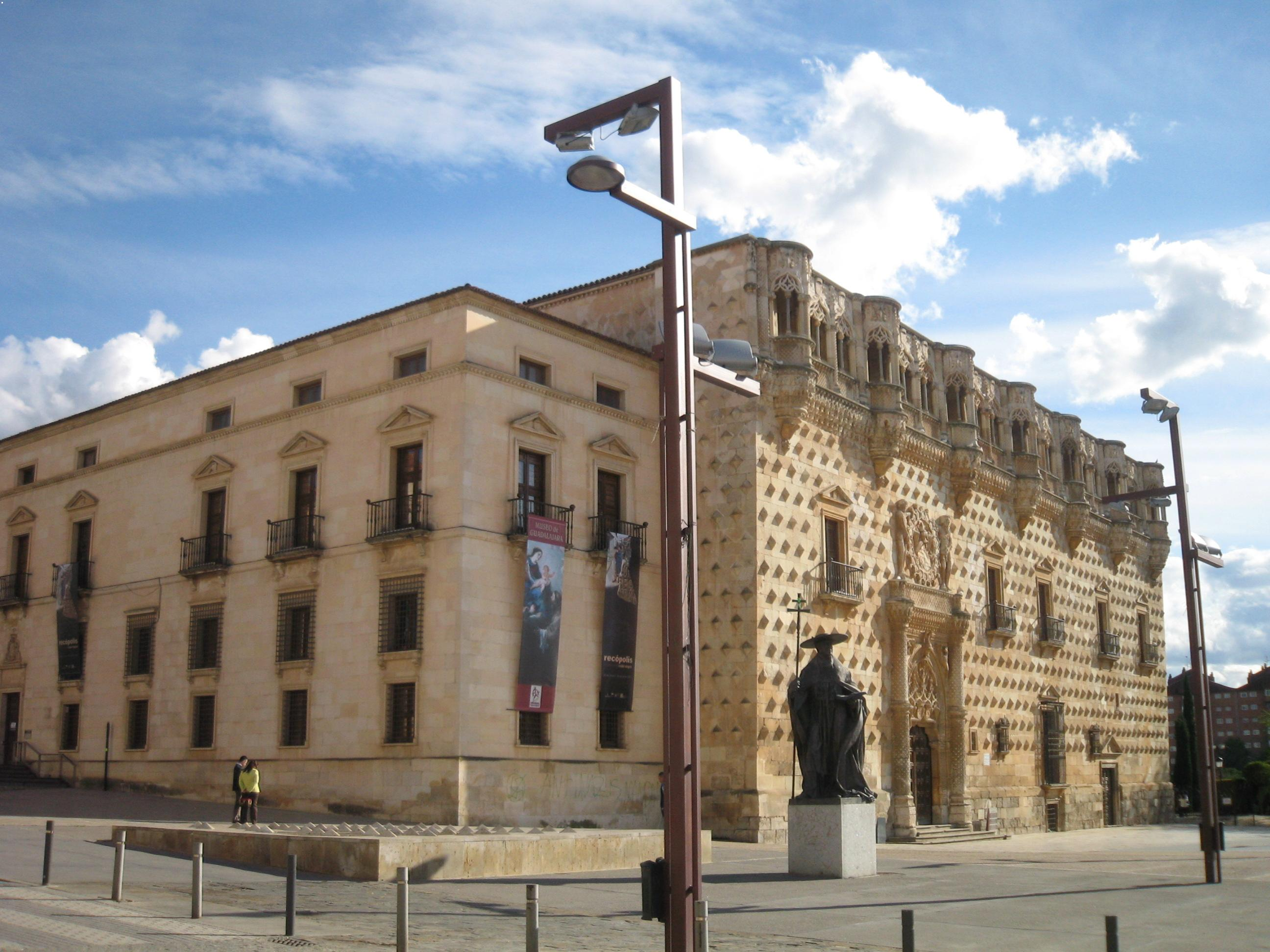 Palacio del Infantado in Guadalajara, Spain